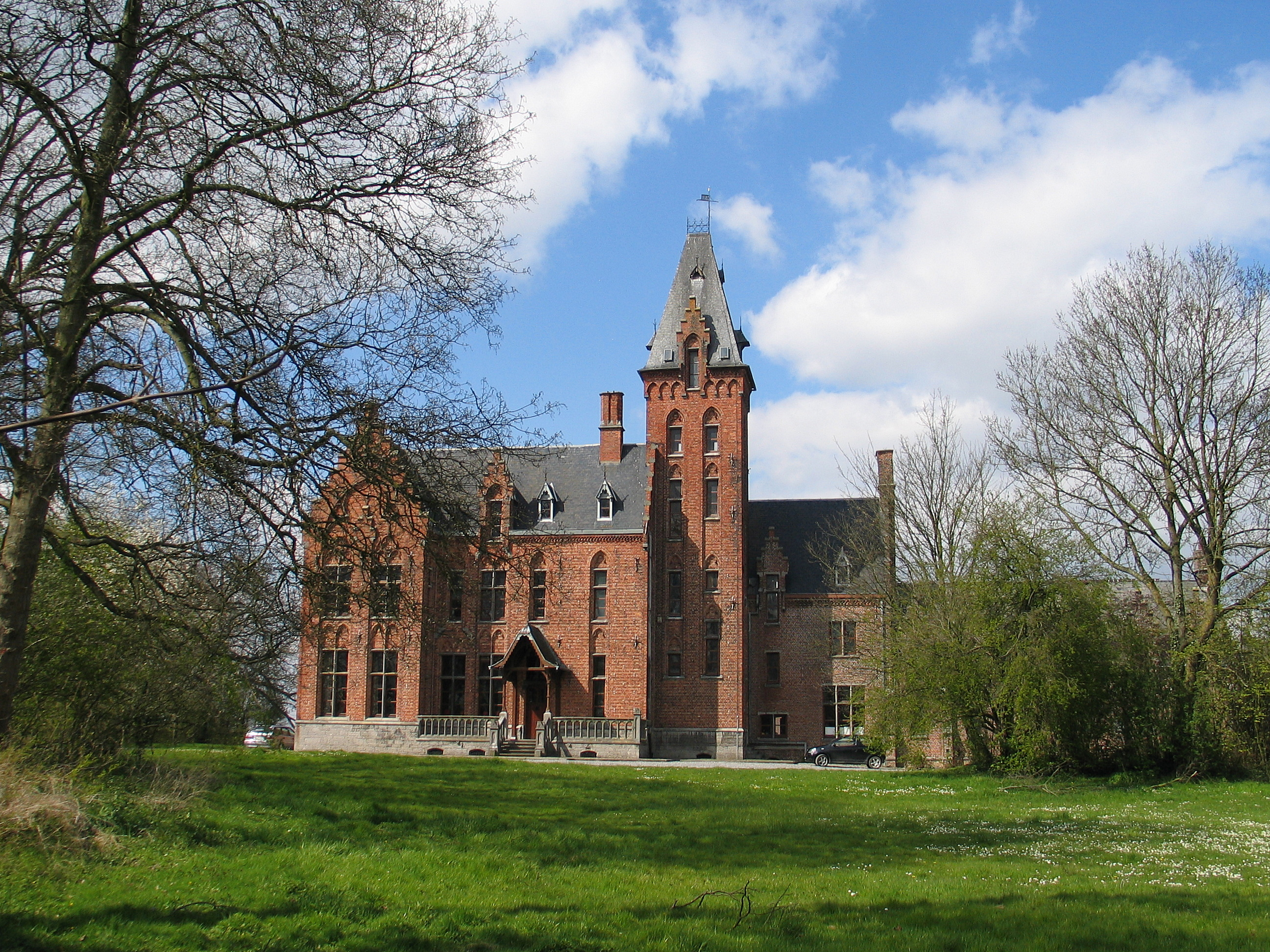 kasteel Nihoul in Cras-Avernas, België